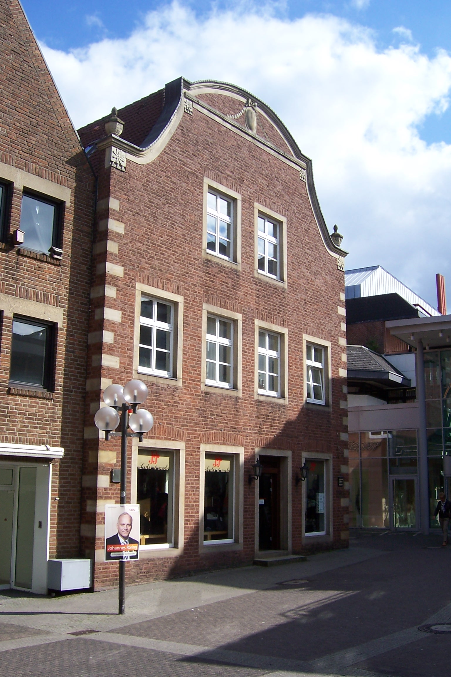 Haus (ehem Vennestrasse 1) Kornmarkt 4 Borken NRW Germany. Rekonstruierender Neubau im Rahmen der Stadtsanierung (1976-79); Denkmalschutz besteht trotzdem.